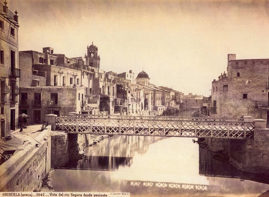 Vista del riu Segura al seu pas per la ciutat d'Oriola, Baix Segura, País Valencià. Foto des de ponent de Jean Laurent (1816-1886).